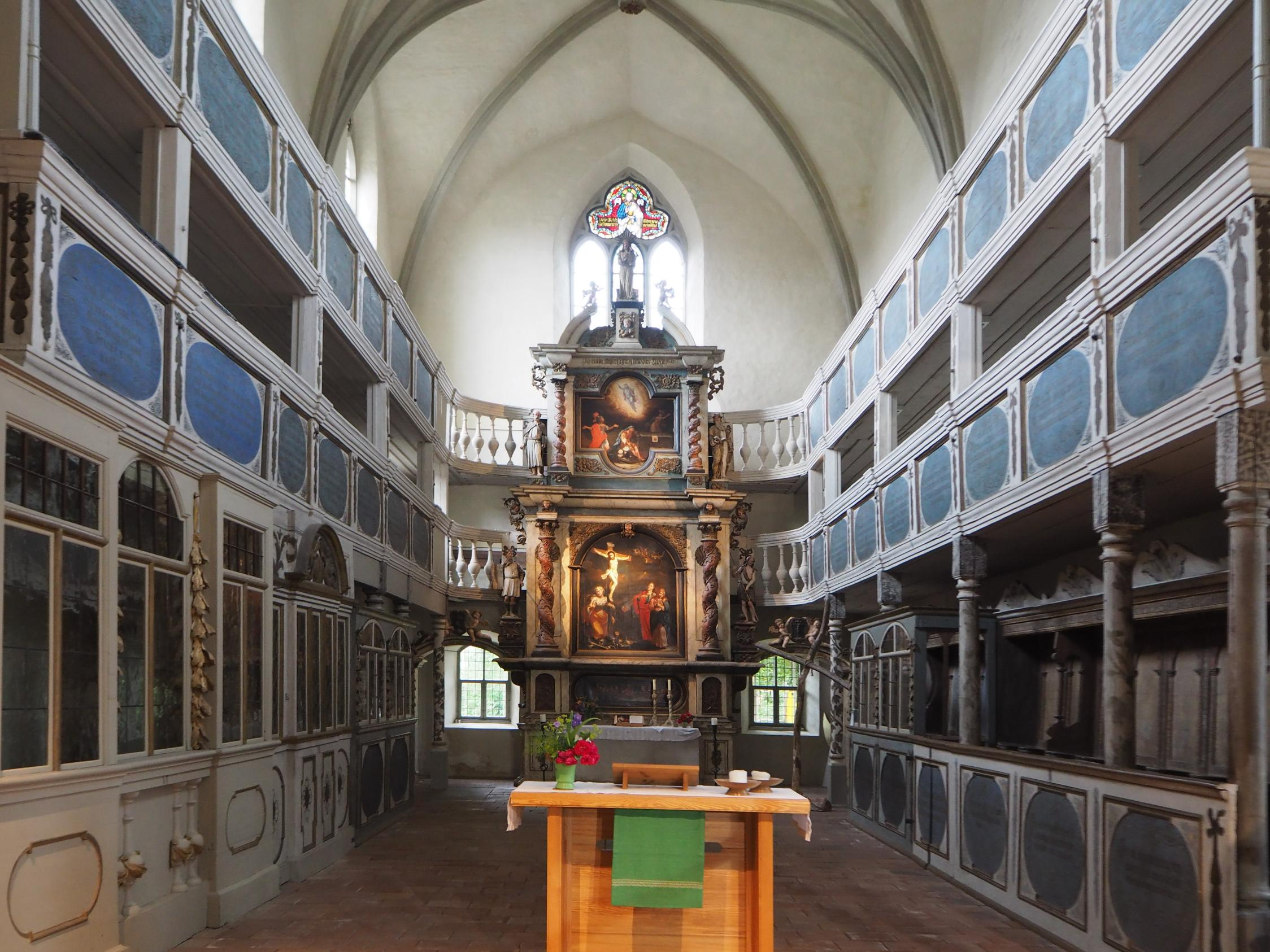 Coswig (Anhalt),St. Nicolai, Chorbereich, Foto: Juni 2015